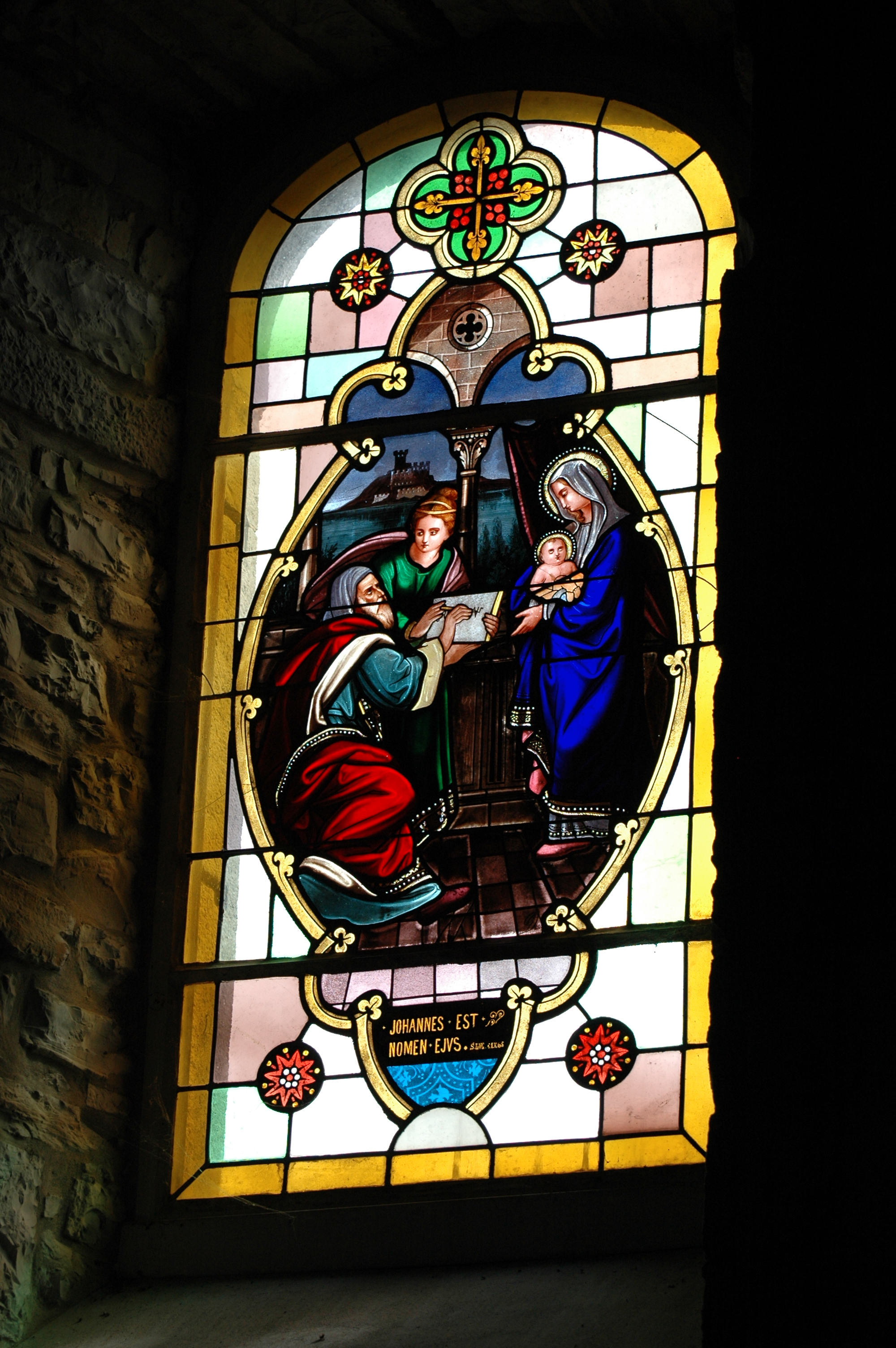 Irissarry, vitrail de l'église Saint-Jean-Baptiste; St.Jean reçoit son nom